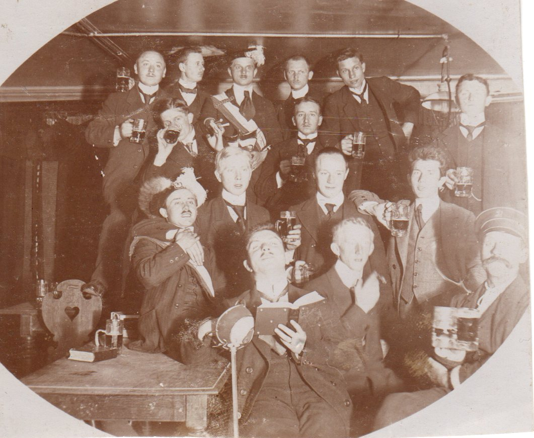 Kneipe der Frankonia in der dicken Marie, 1913